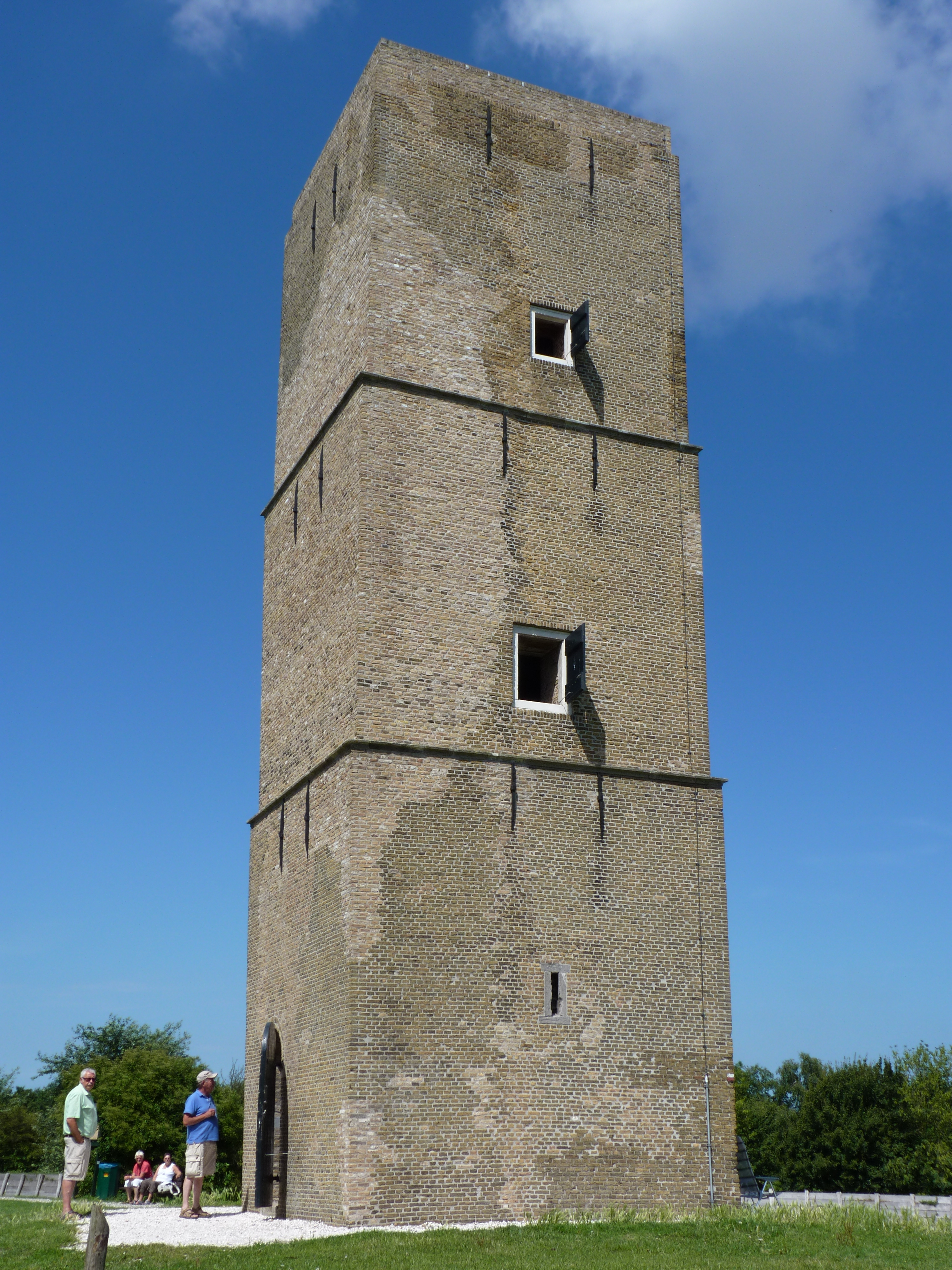 Oostvoorne, Stenen Baak, verlengde van de Heyndijk, Oostvoorne (gemeente Westvoorne) Rijksmonument nr: 38887. Een oude vuurtoren (1674), gelegen aan de Brielse Maas